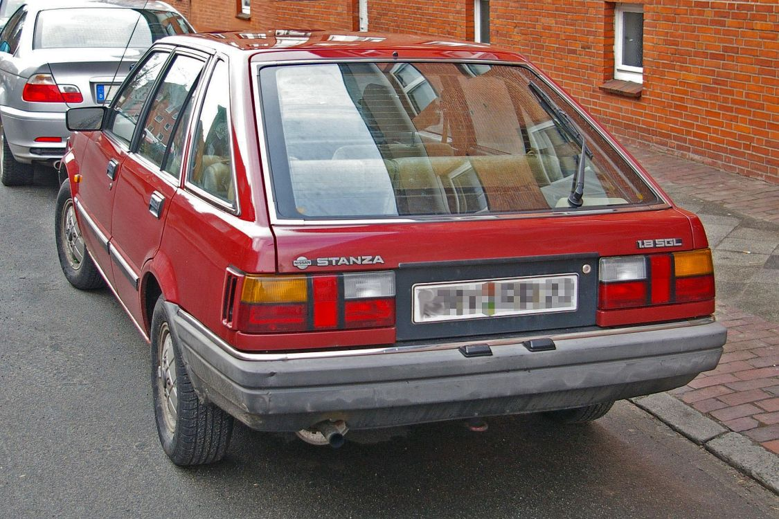 Nissan Stanza Schräghecklimousine mit 1.8l Hubraum